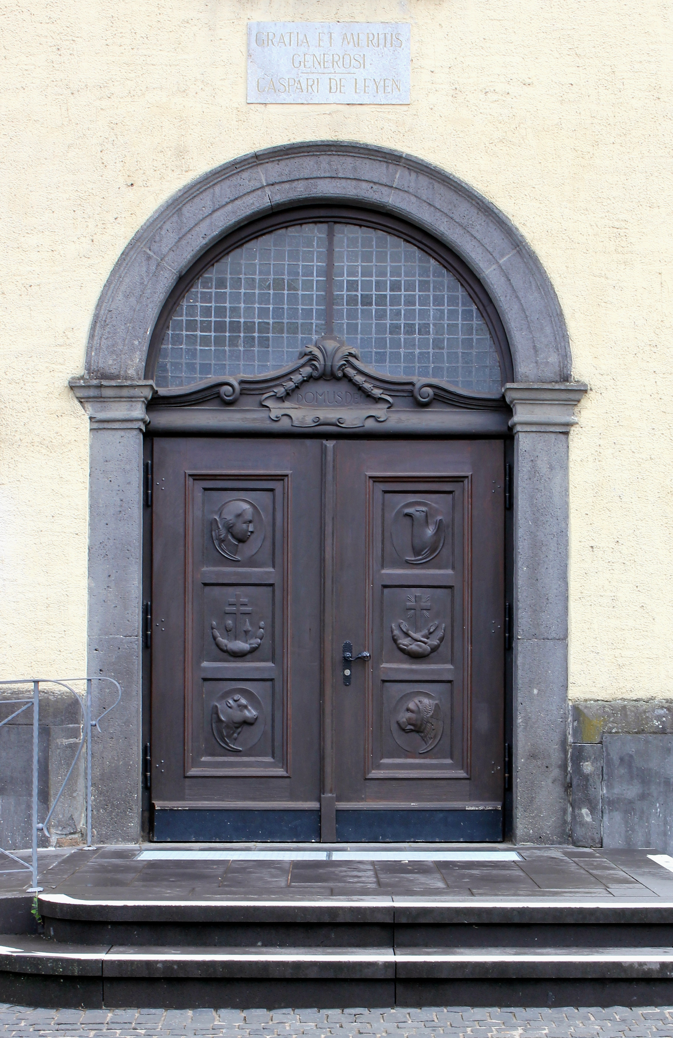 Koblenz, Kapuzinerplatz 134: Portal der Kapuzinerkirche in Koblenz